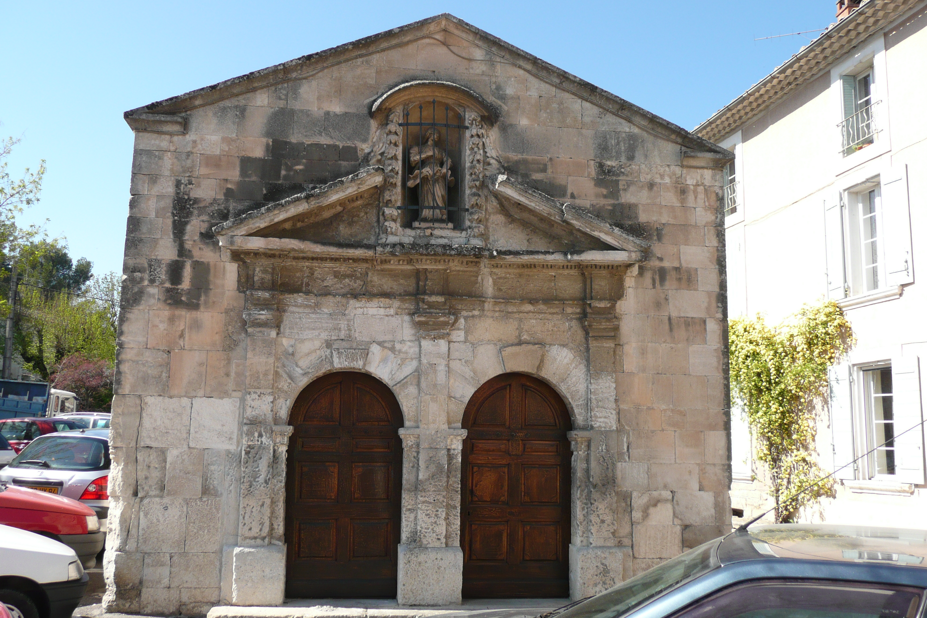 Chapelle Notre Dame de Rose XVIIe siècle à Pernes les Fontaines.